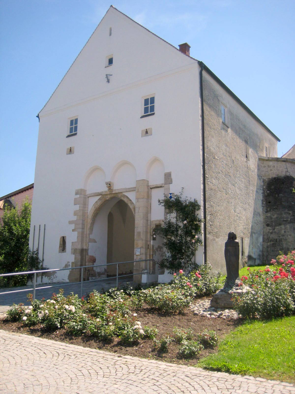 Vohburg an der Donau ist eine Gemeinde im Landkreis Pfaffenhofen a.d. Ilm.